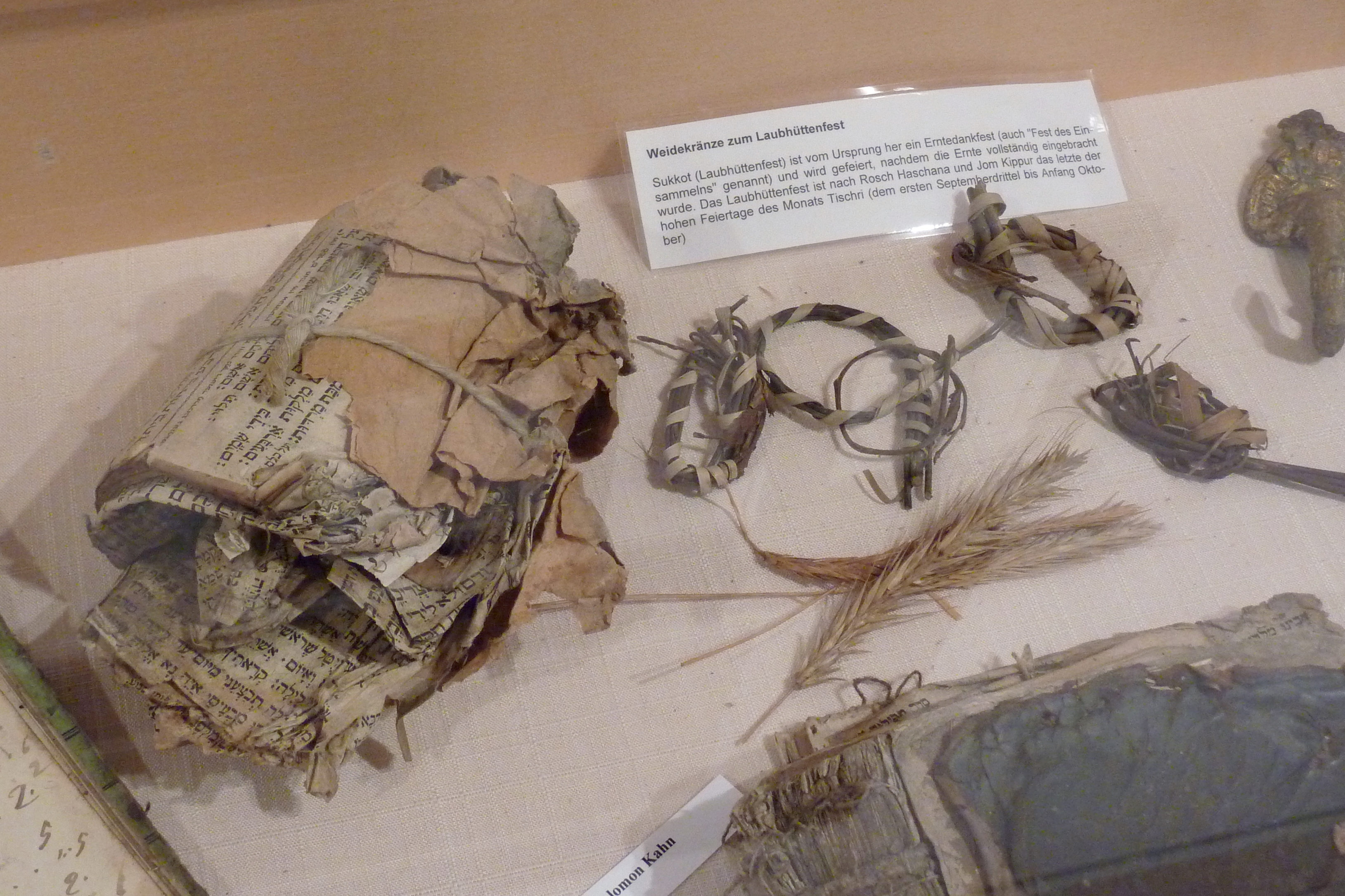 Genisa Niederzissen, Ausstellung in der ehemaligen Synagoge in Niederzissen im Landkreis Ahrweiler (Rheinland-Pfalz), Weidenkränze für das Laubhüttenfest (Sukkot)